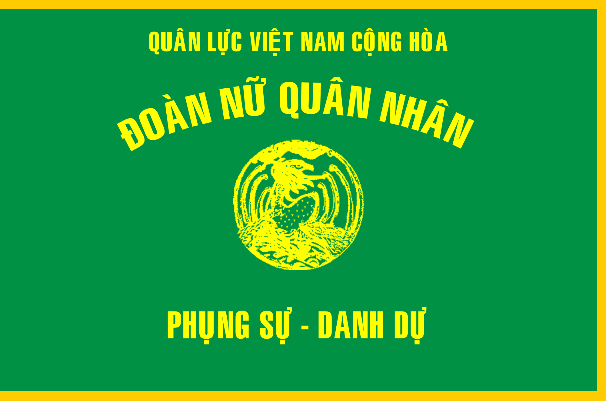 The flag of South Vietnamese Women's Armed Forces Corps (Đoàn nữ quân nhân Việt Nam Cộng hòa), used since 1965 to 1975.